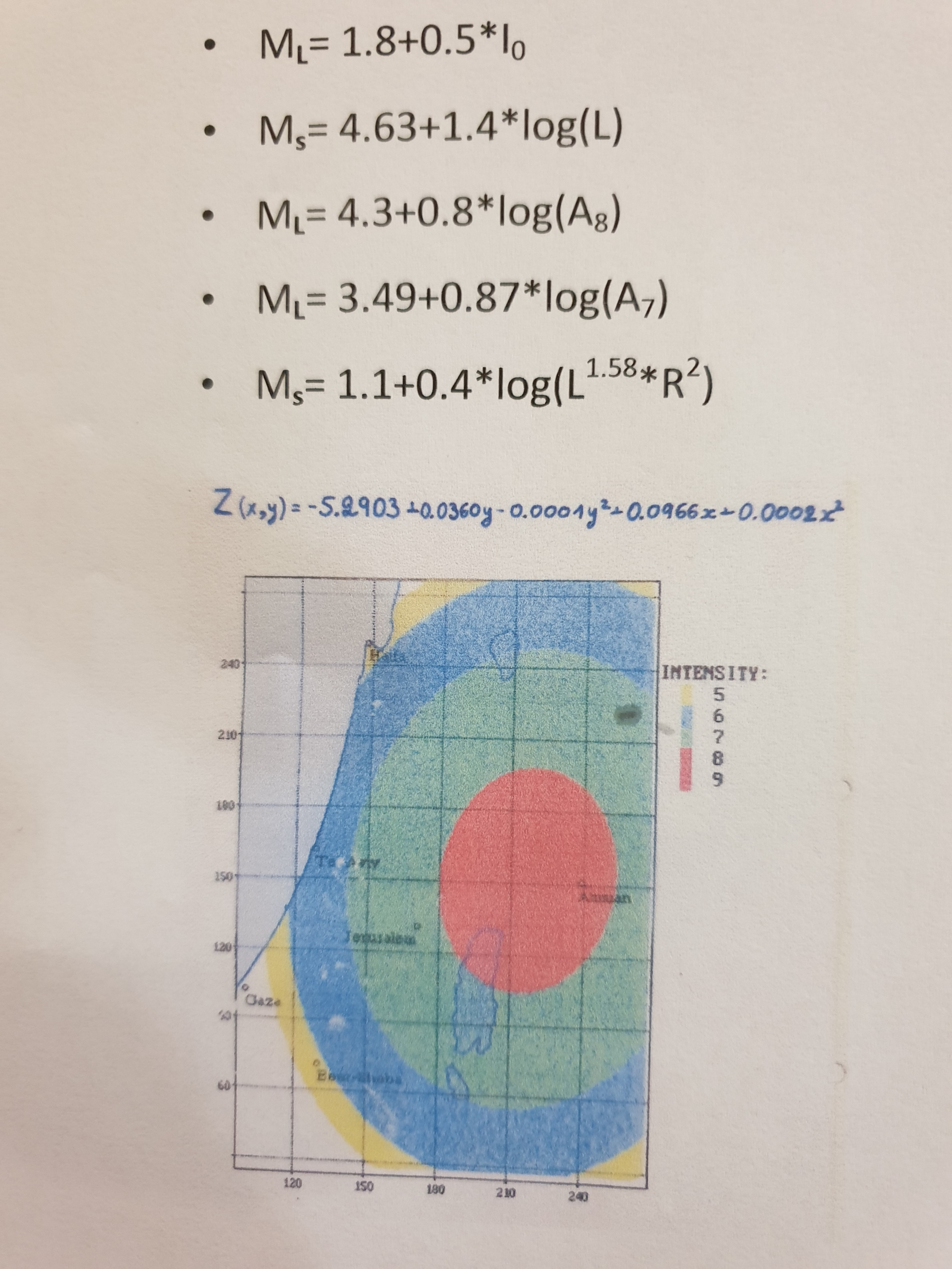 Equations for Isoseismic Map